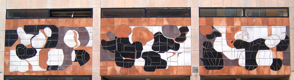 Fasadutsmyckning by Per Lindecrantz (1913) from 1960. (Sculpture mosaic) Fasade beautification in hard burnt clay (Fasadutsmyckning i hårdbränd lera) in Västerås, Sweden.Near the intersection of Kopparbergsvägen and Smedjegatan, on Smedjegatan. Ordered by Föreningen Folkets Hus och Park. Funded with contributions from Västerås Kommun.